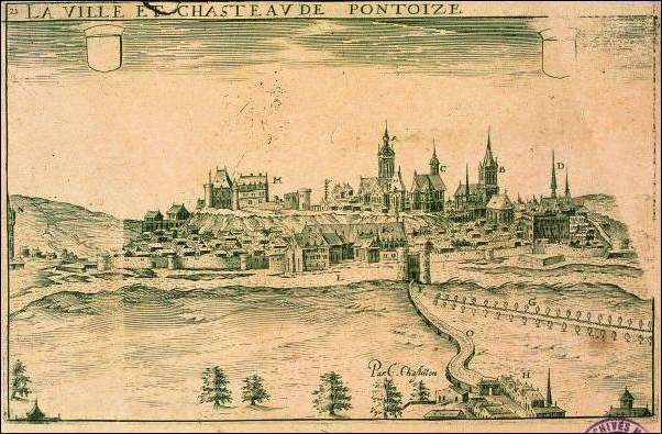 Pontoise (France) : La ville et le chasteau de Pontoiz